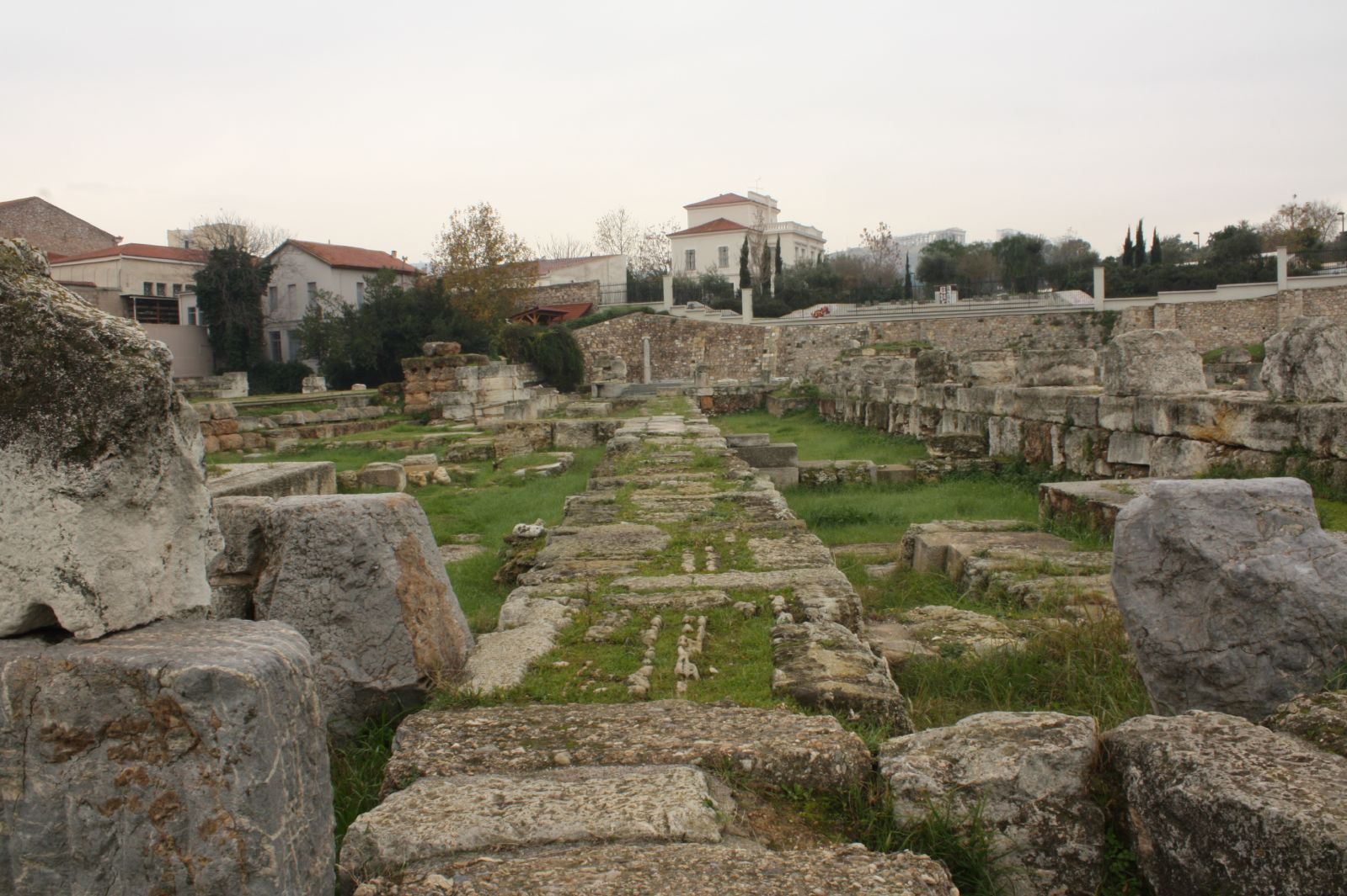 Kerameikos 26